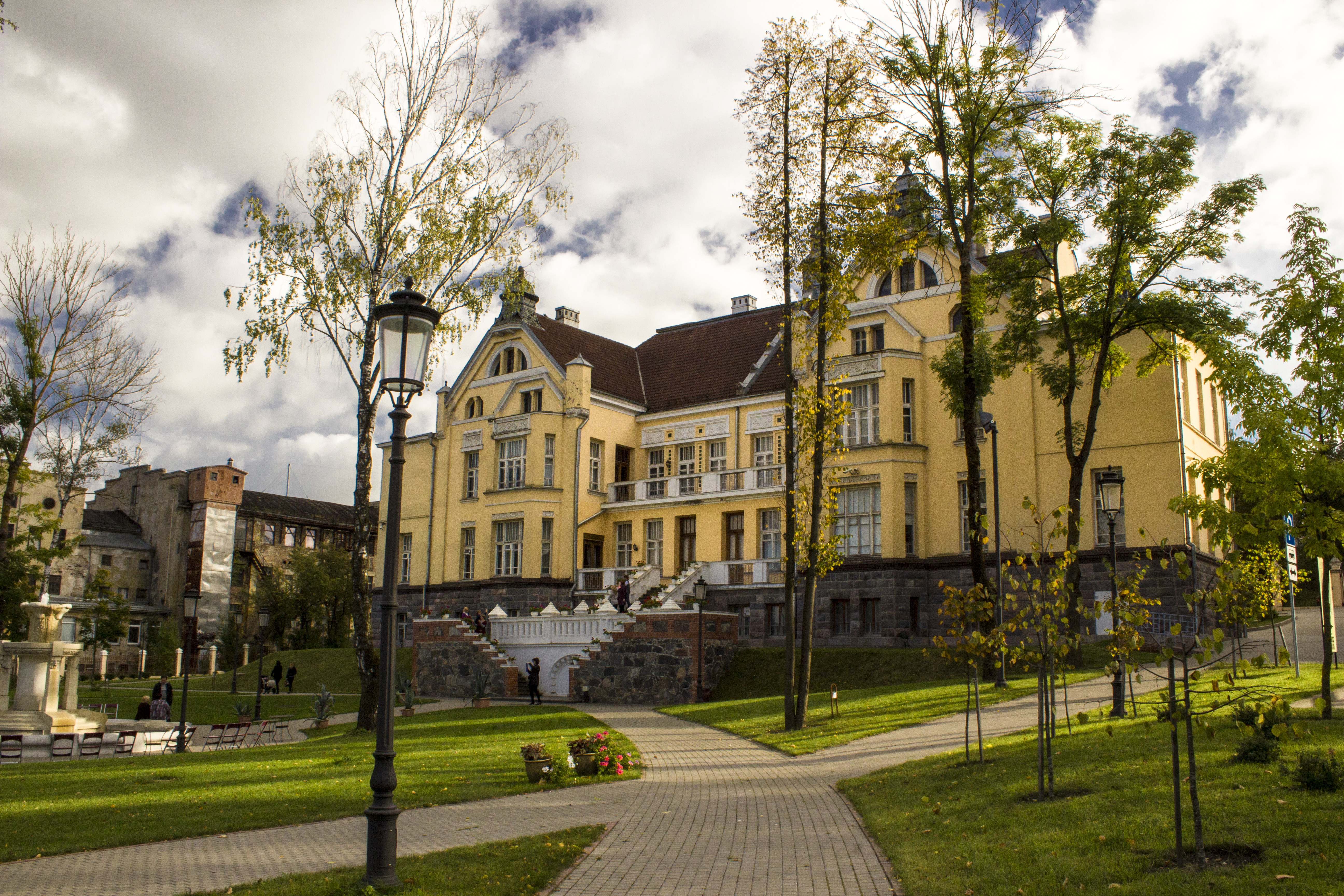 Chaimas Frenkelis Villa